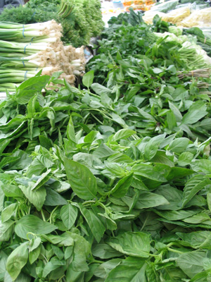 Herbs: basil, scallion